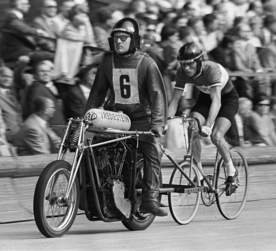 Piet de Wit at world championships